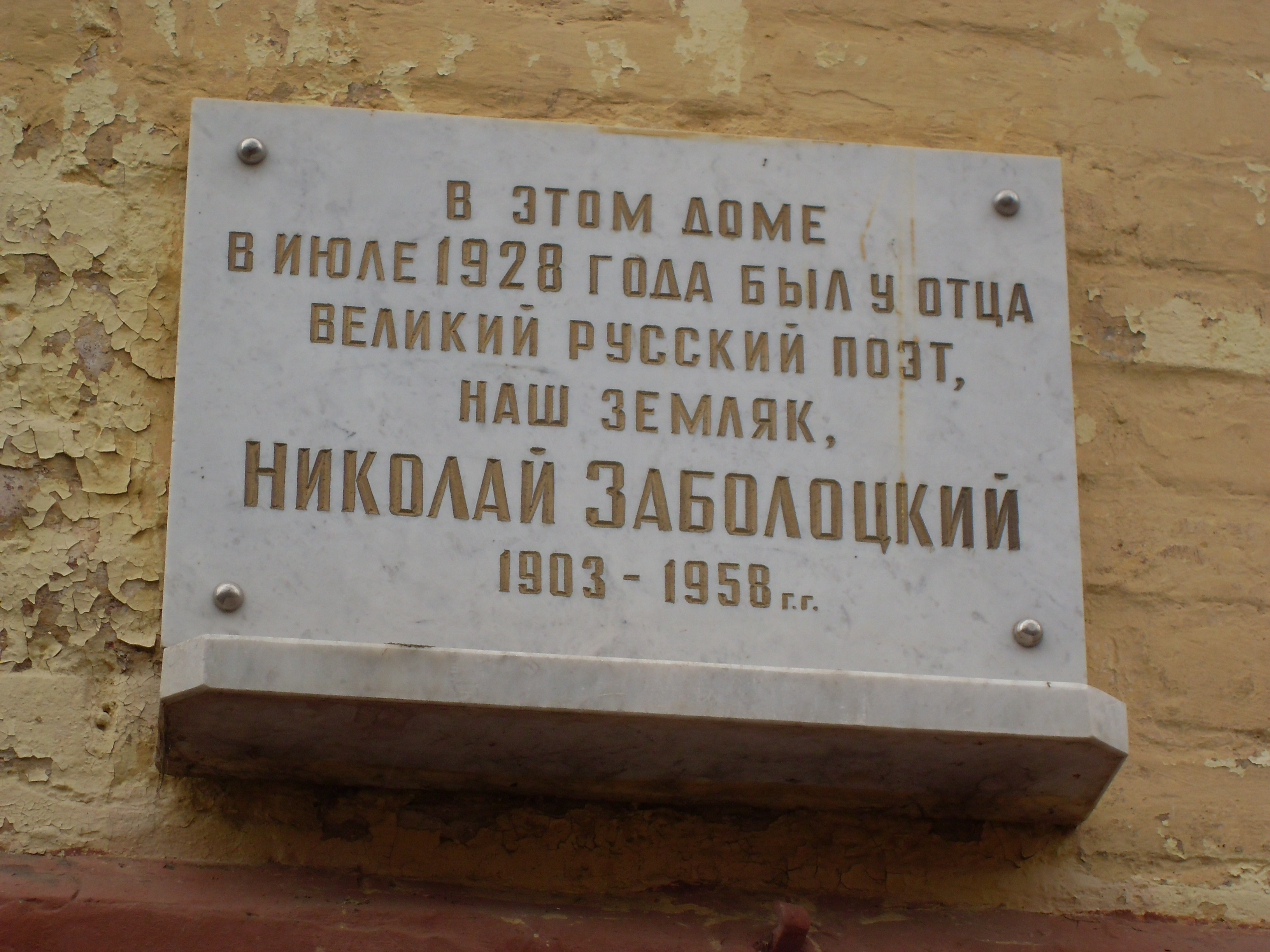 Мемориальная доска Николаю Заболоцкому в г.Киров